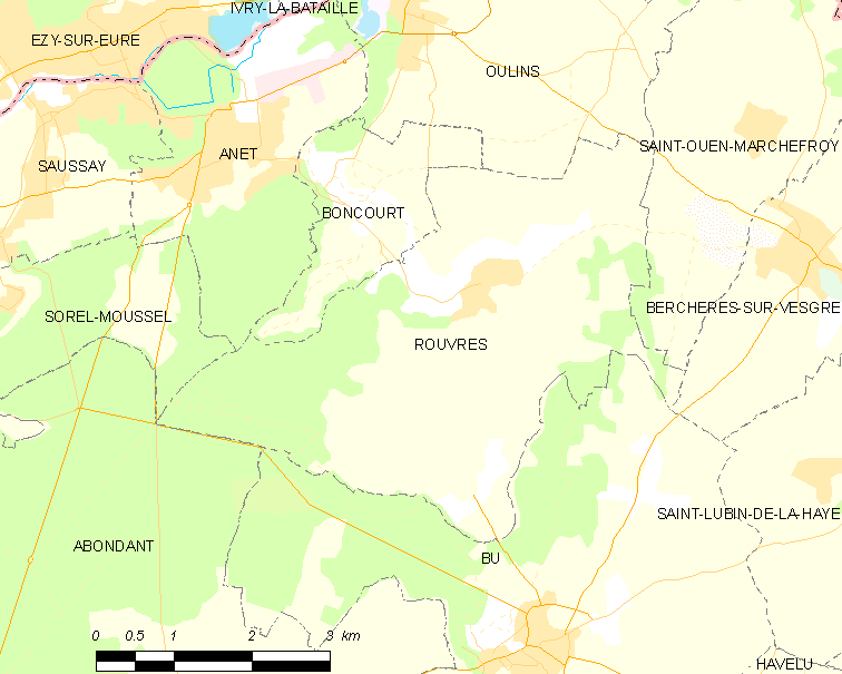 Carte de Rouvres et des communes limitrophes. Template:Map commune FR insee code 28321.png